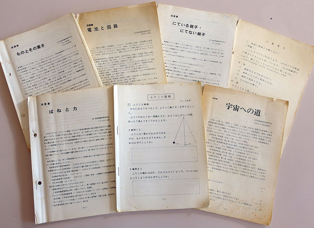 仮説実験授業で使用される授業書からいくつかを紹介